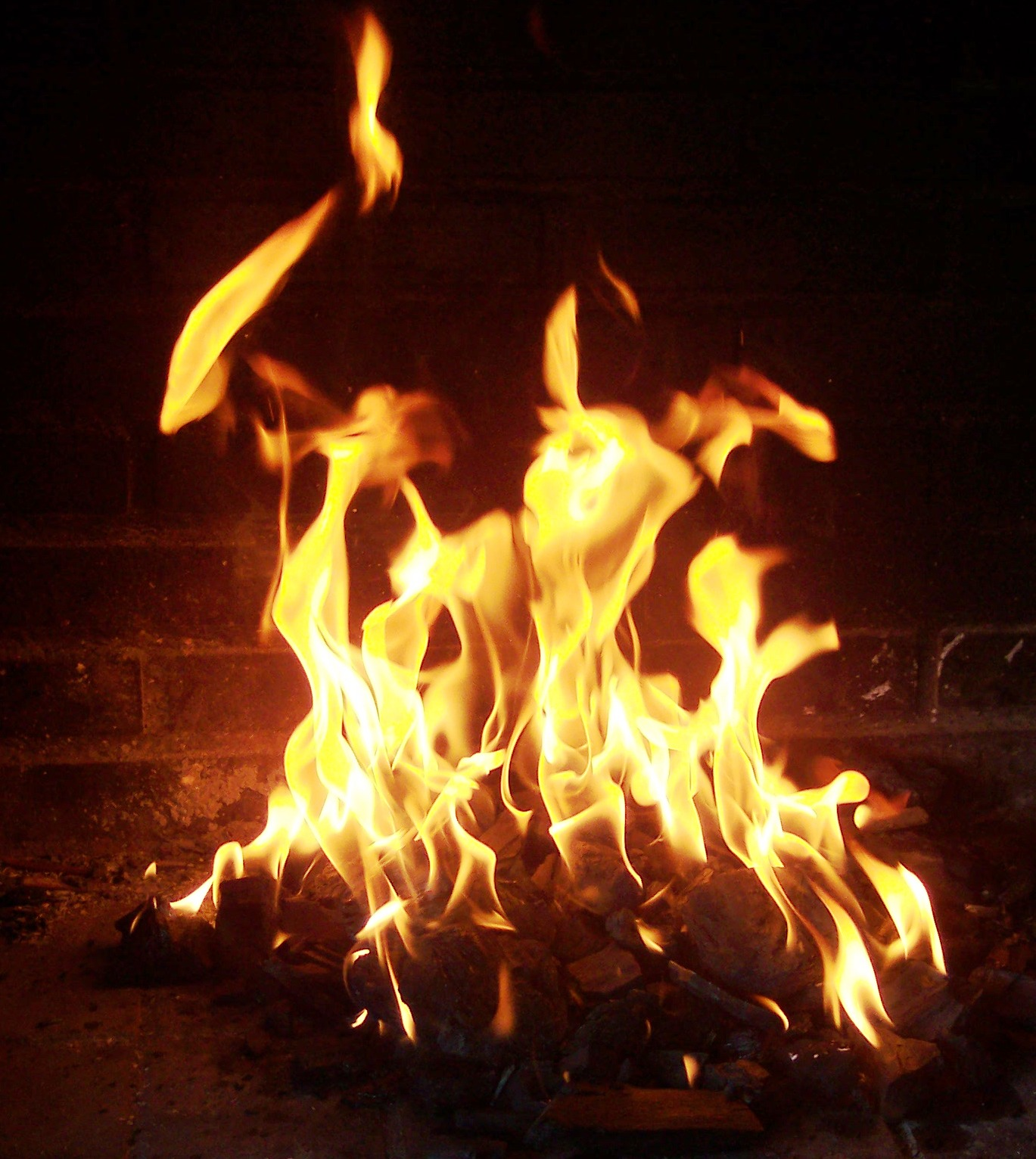 Fire